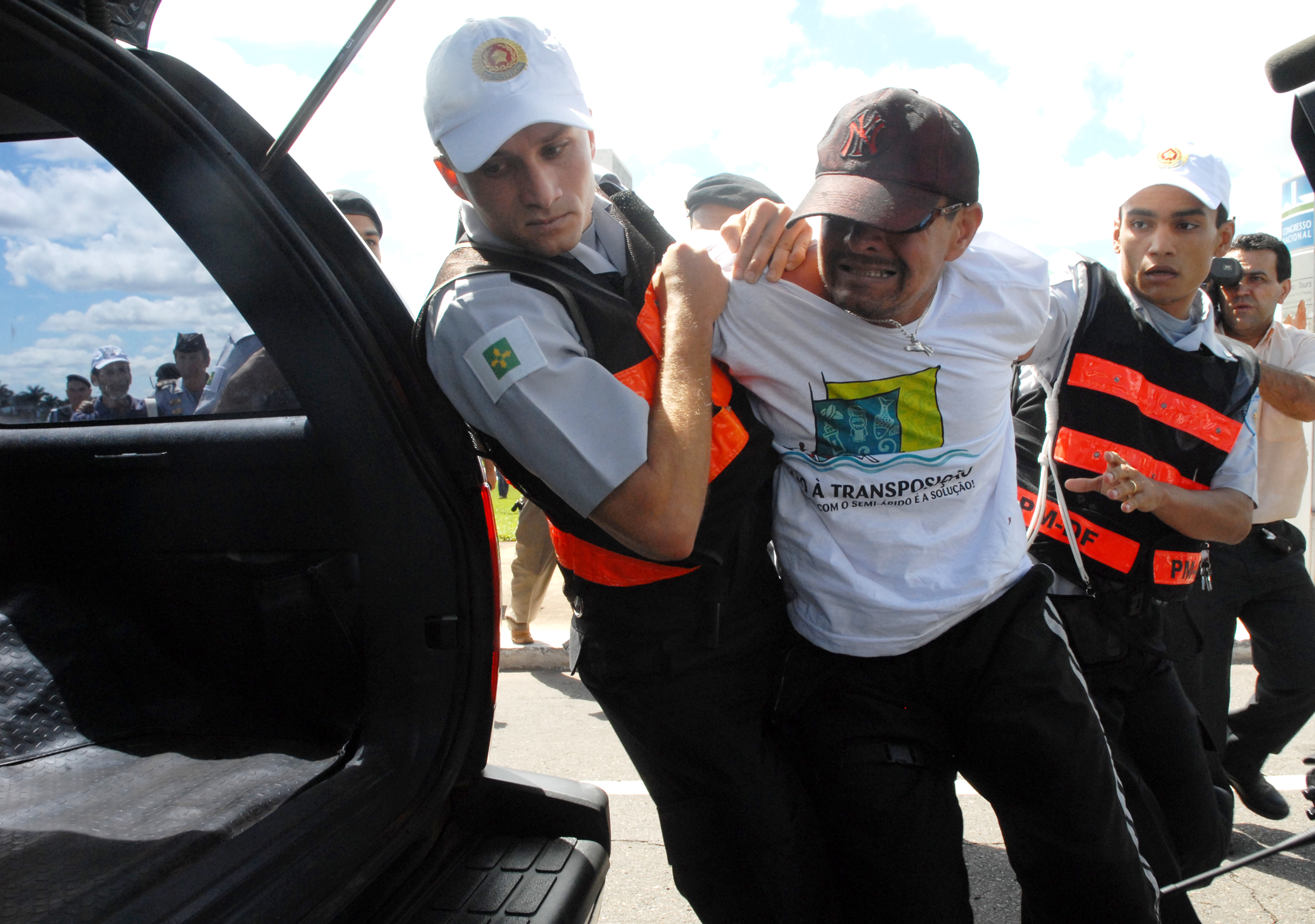 homem sendo preso